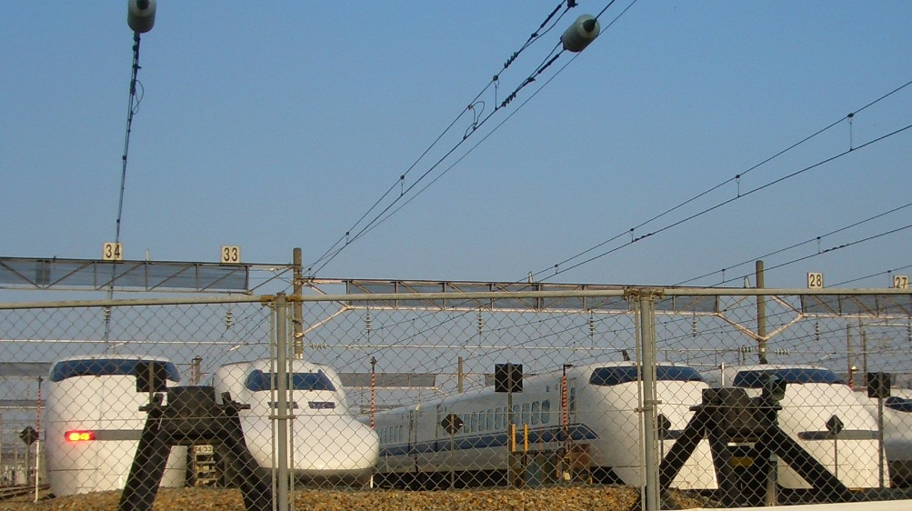 Torikai Shinkansen_BASE in Settsu City,Osaka,Japan 新幹線 鳥飼基地